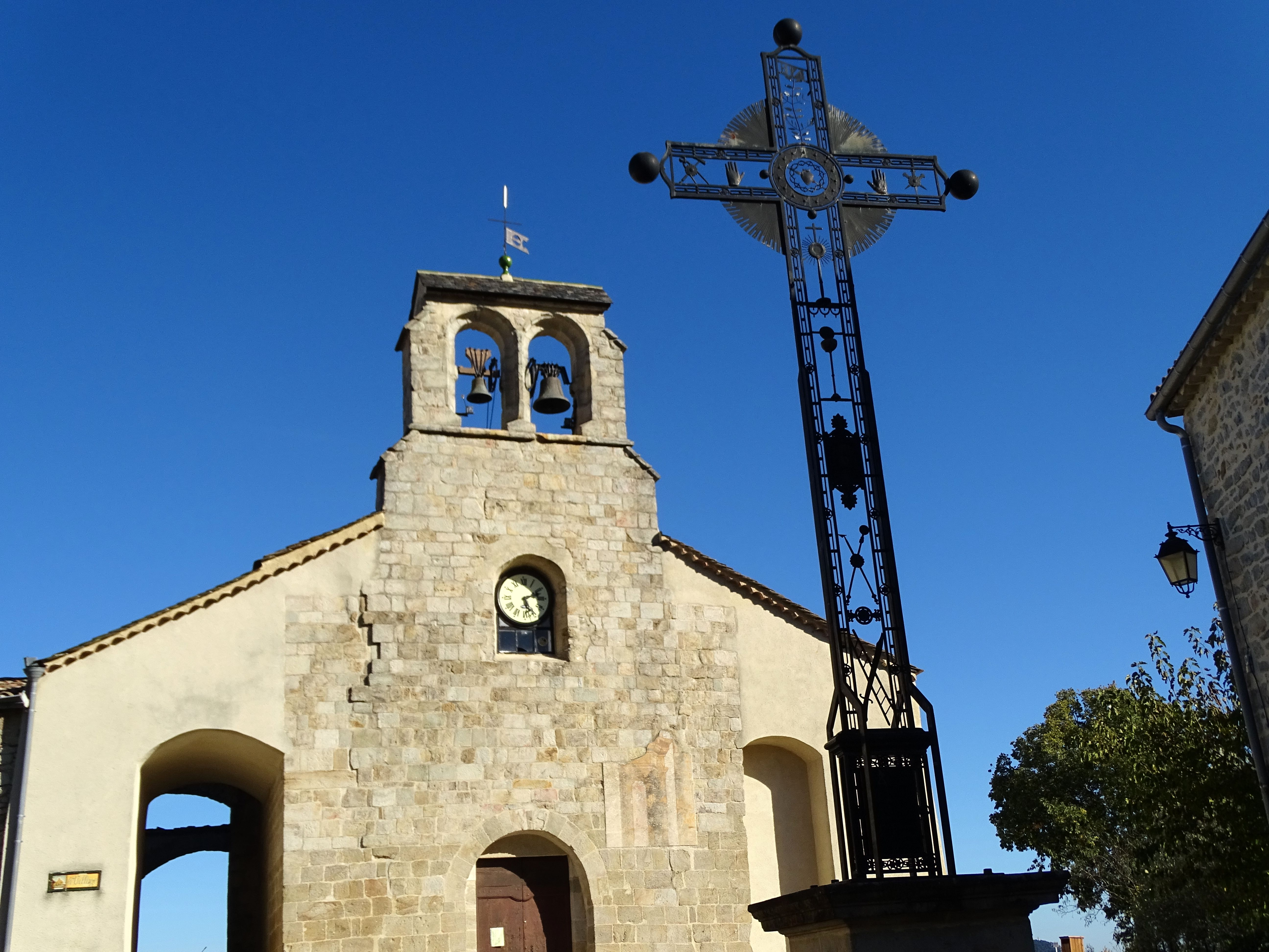 Église de la Nativité-de-Marie de Courry